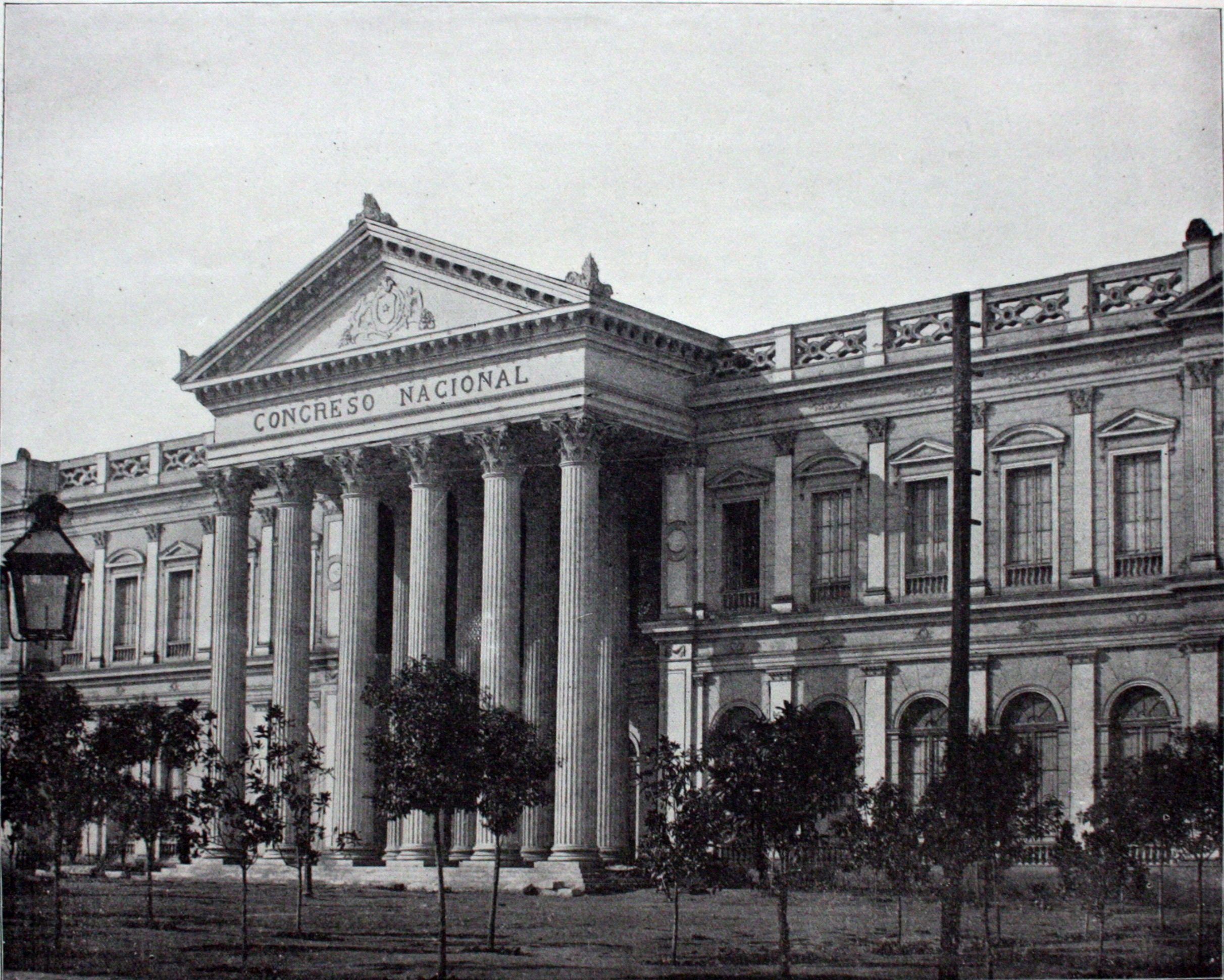 STODDARD, John L. Portfolio colonial, dépeignant les paysages, les villes et les industries des possesions et dépendances françaises, ainsi que des pays que, quoique n’étant pas effectivement sous notre protectorat, font néanmoins partie de la France coloniale en raison de leurs moeurs, leurs traditions et leur langage. Paris, the Werner Company de Chicago, 1895